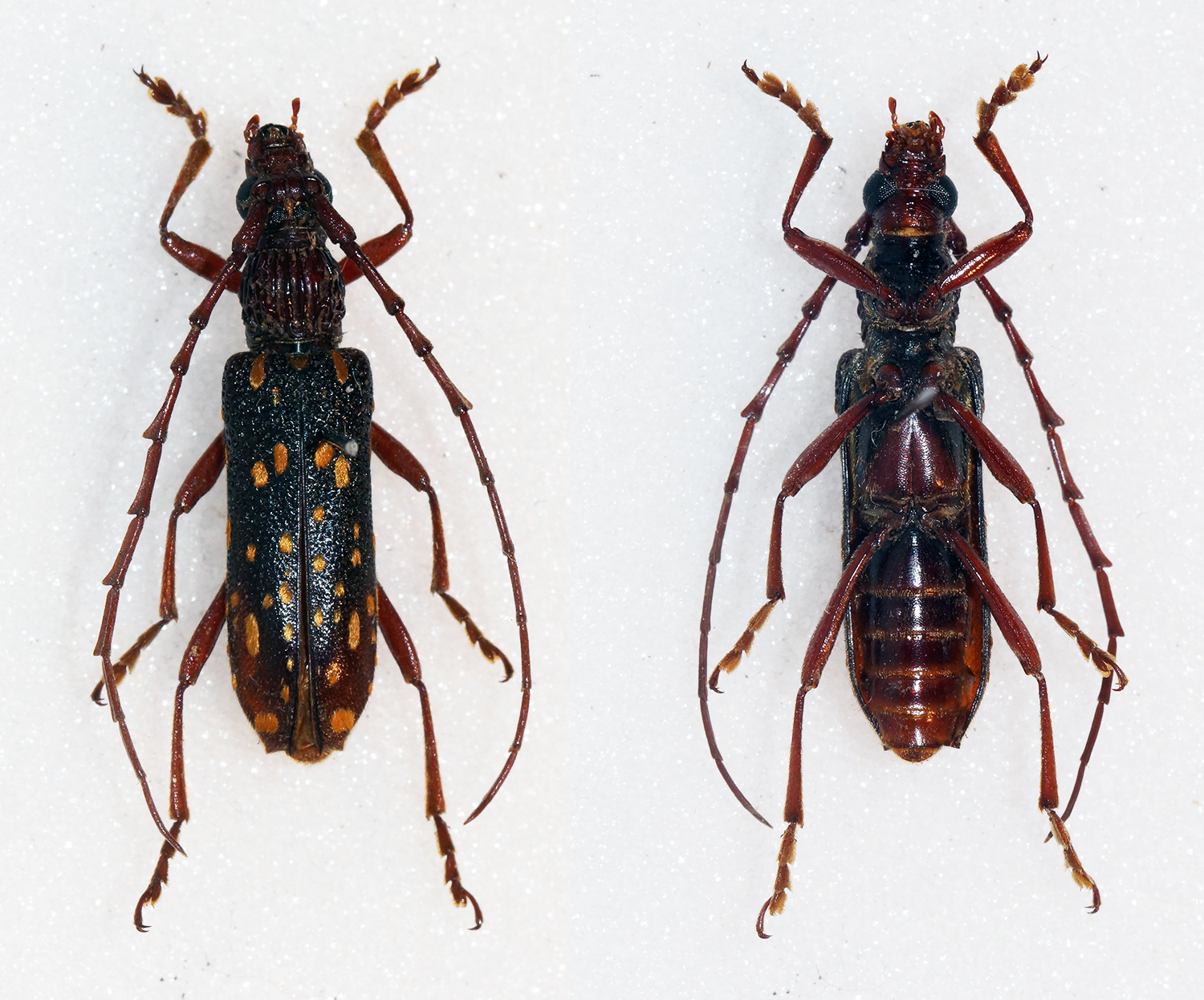 Pic,1923 Sex: Male Data: 10-06-14 - Mt Ailaoshan 2300m - Xinping - Yunnan - China Size: 19mm